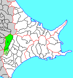 北海道上川郡（十勝国）の位置。